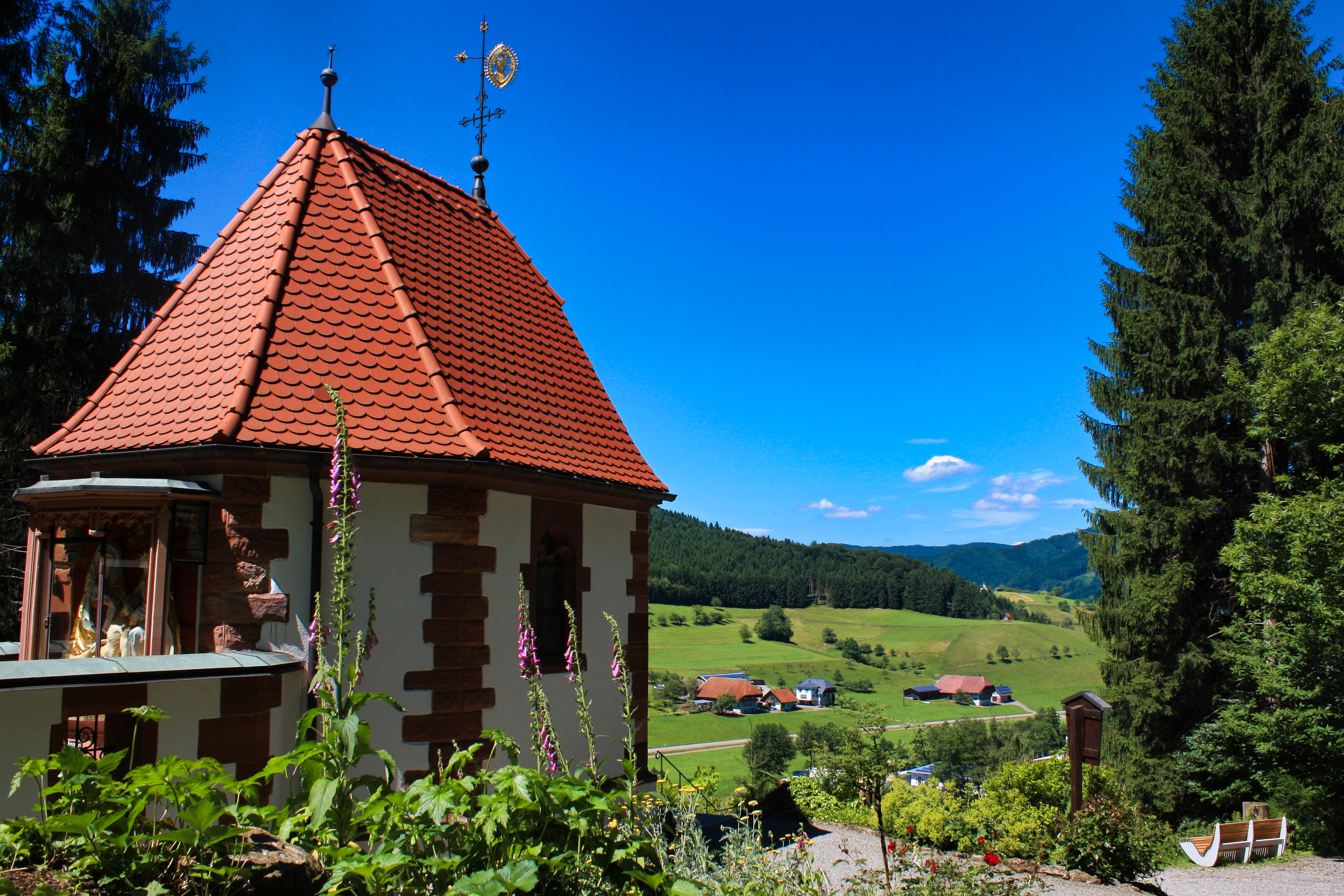 Hansjakobkapelle